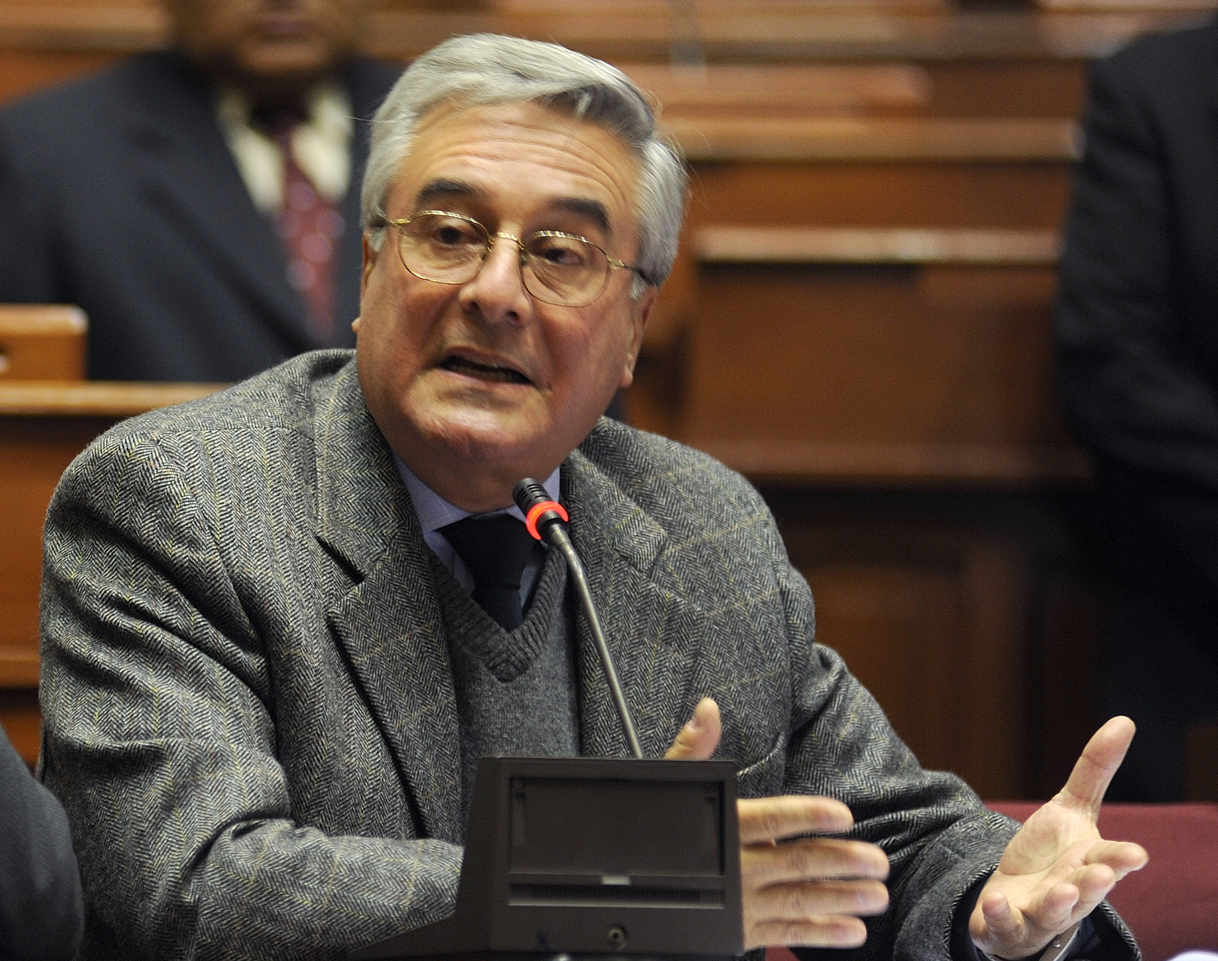 Congresista Javier Bedoya de Vivanco interviene en sesión realizada esta tarde por la Comisión Permanente del Congreso.